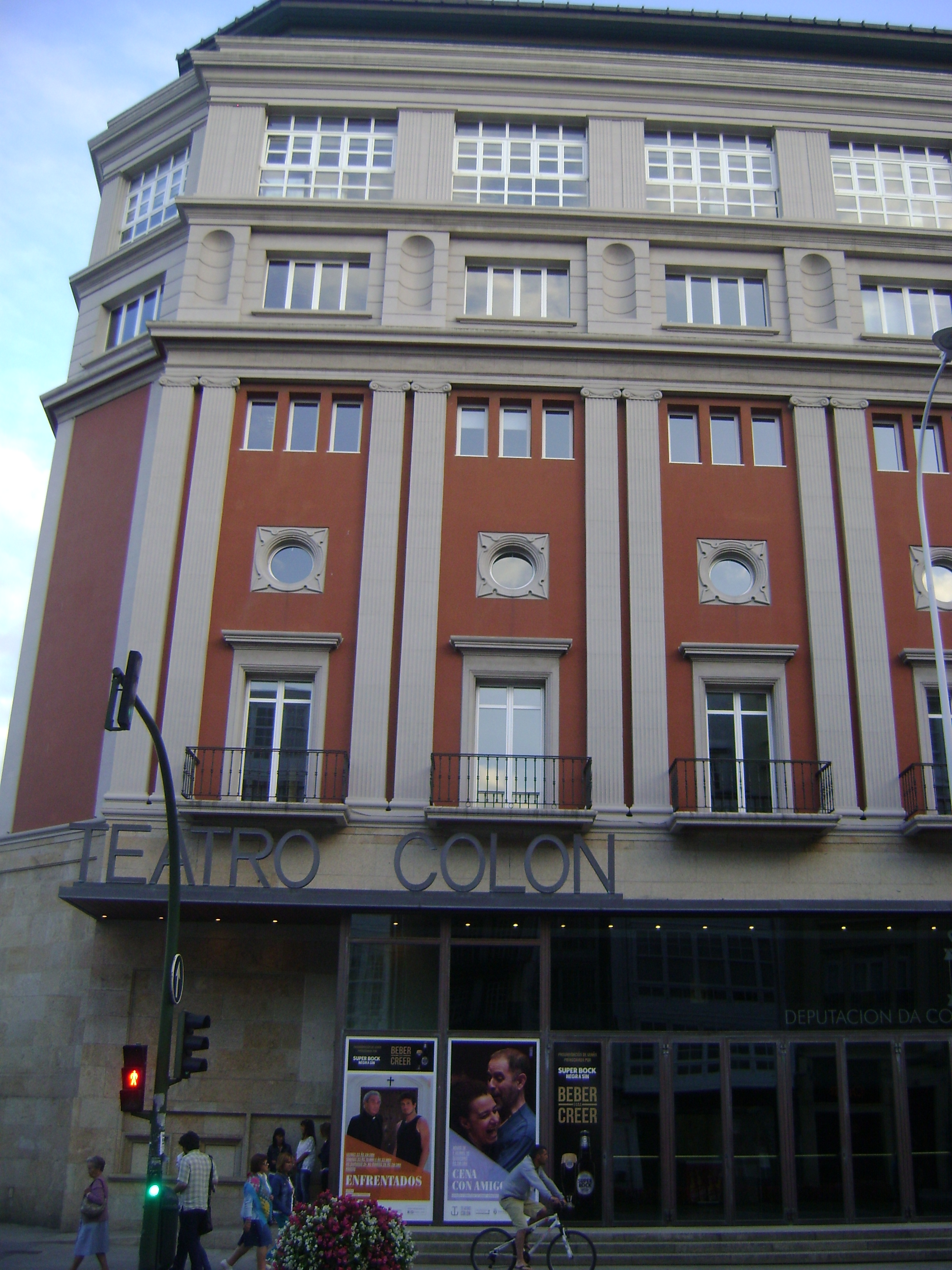 Teatro Colón, La Coruña